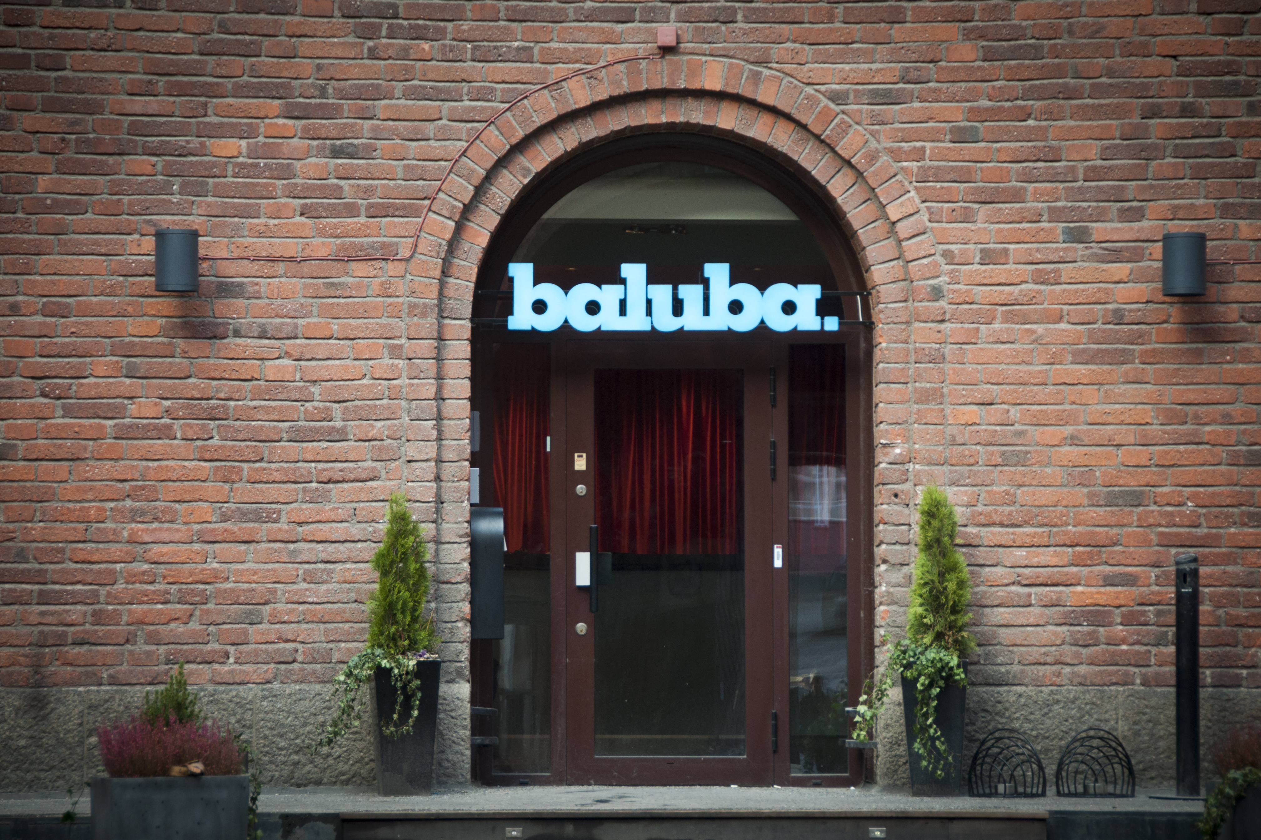 Grönstedska palatset, Städet 9, Nybyggnadsår 1920 - 1924, Cyrillus Johansson (Arkitekt) F. G. Larsson (Byggmästare) Städet AB (Byggherre)